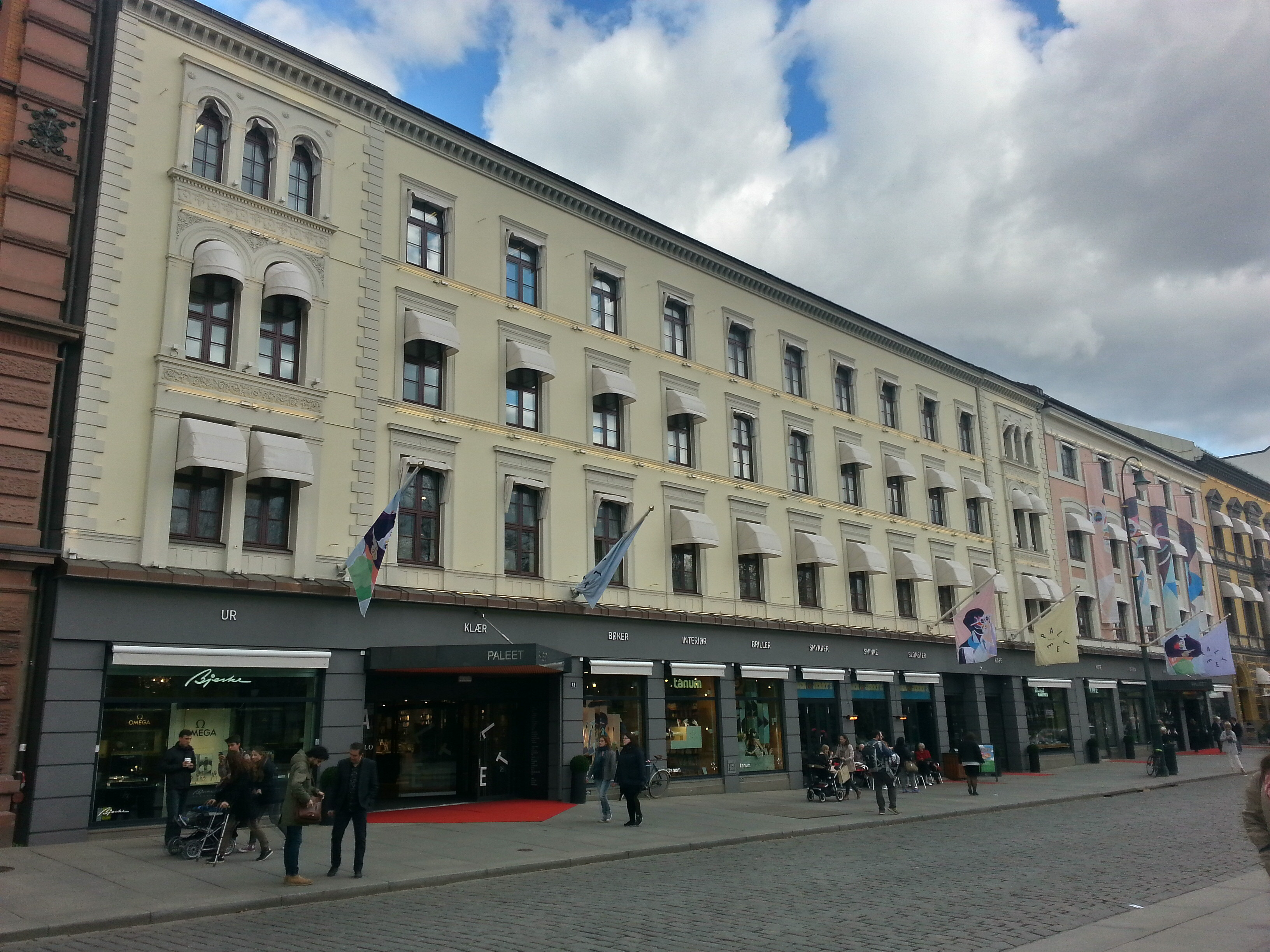 Paleet shoppingsenter i Oslo.